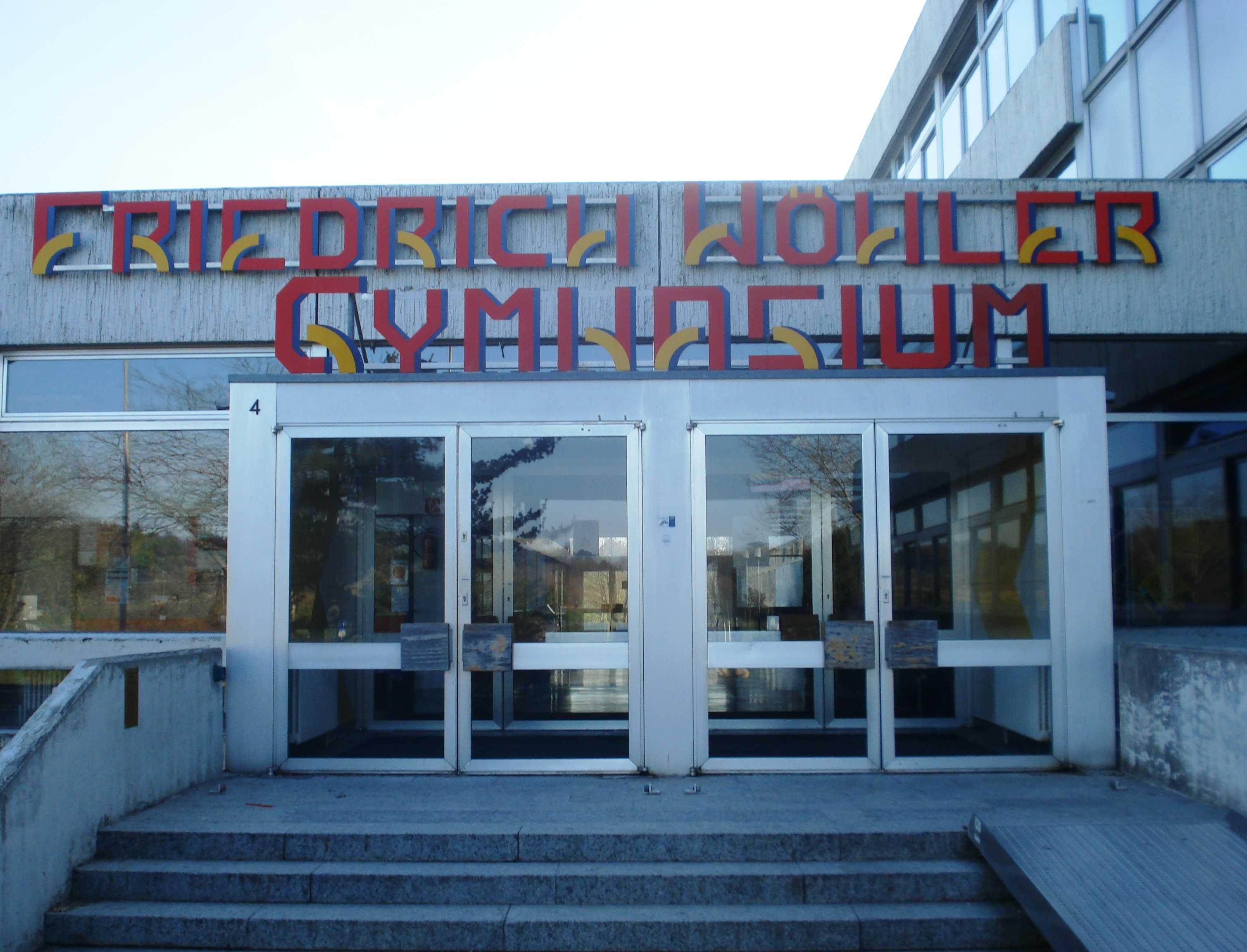 Haupteingang des Friedrich-Wöhler-Gymnasiums